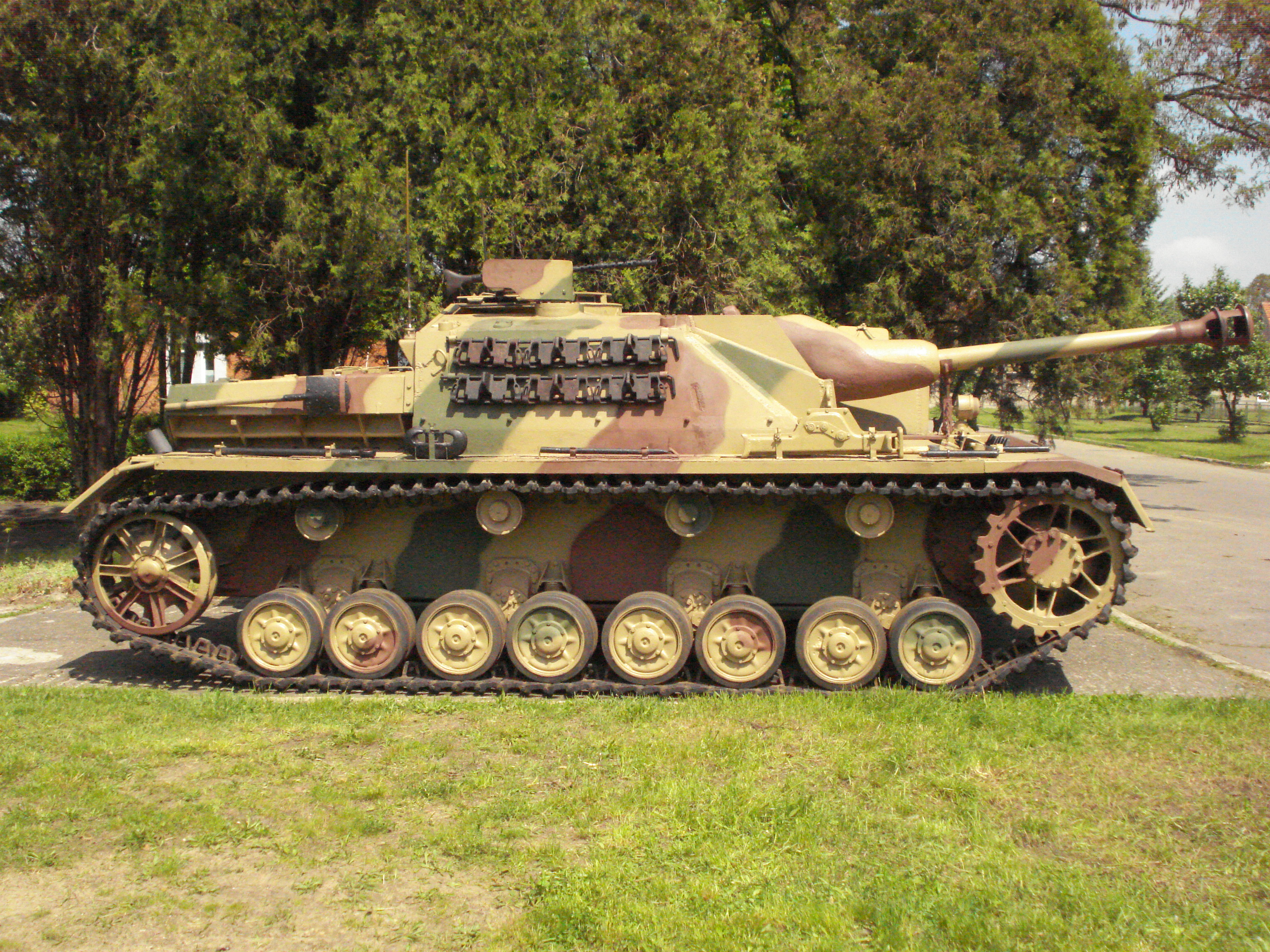 DziałoSturmgeschutz iv Muzeum Broni Pancernej CSWL.JPG